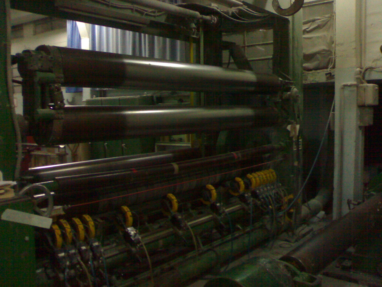 Rebobinadora zona posterior